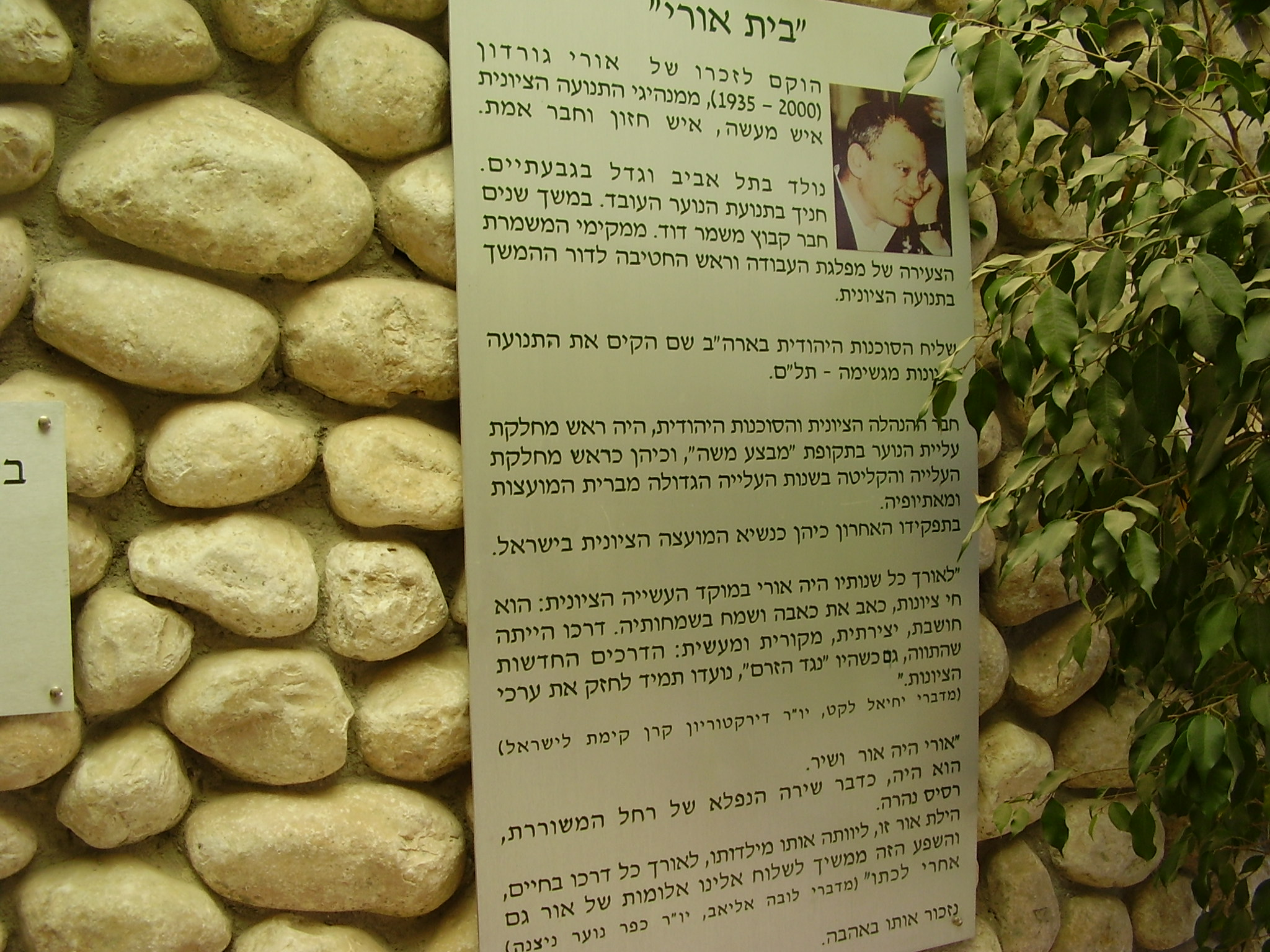 שלט זיכרון לאורי גורדון ב"בית אורי" בניצנה